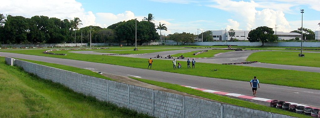 Imagem do miolo do Kartódromo durante a segunda etapa da classe "Cadete" do Campeonato Cearense de Kart de 2006